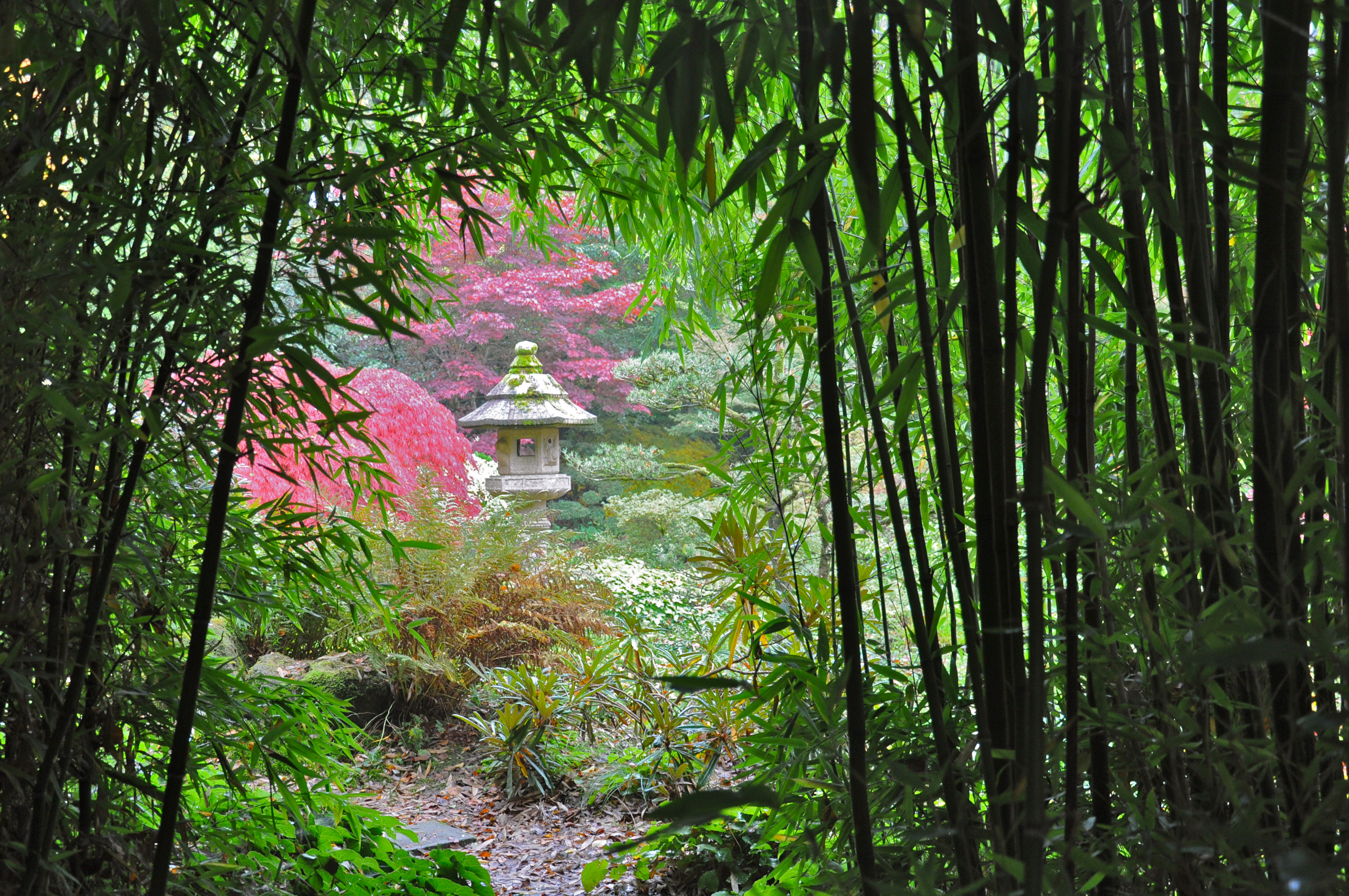 à l'automne 2011 au Parc Botanique de Haute Bretagne